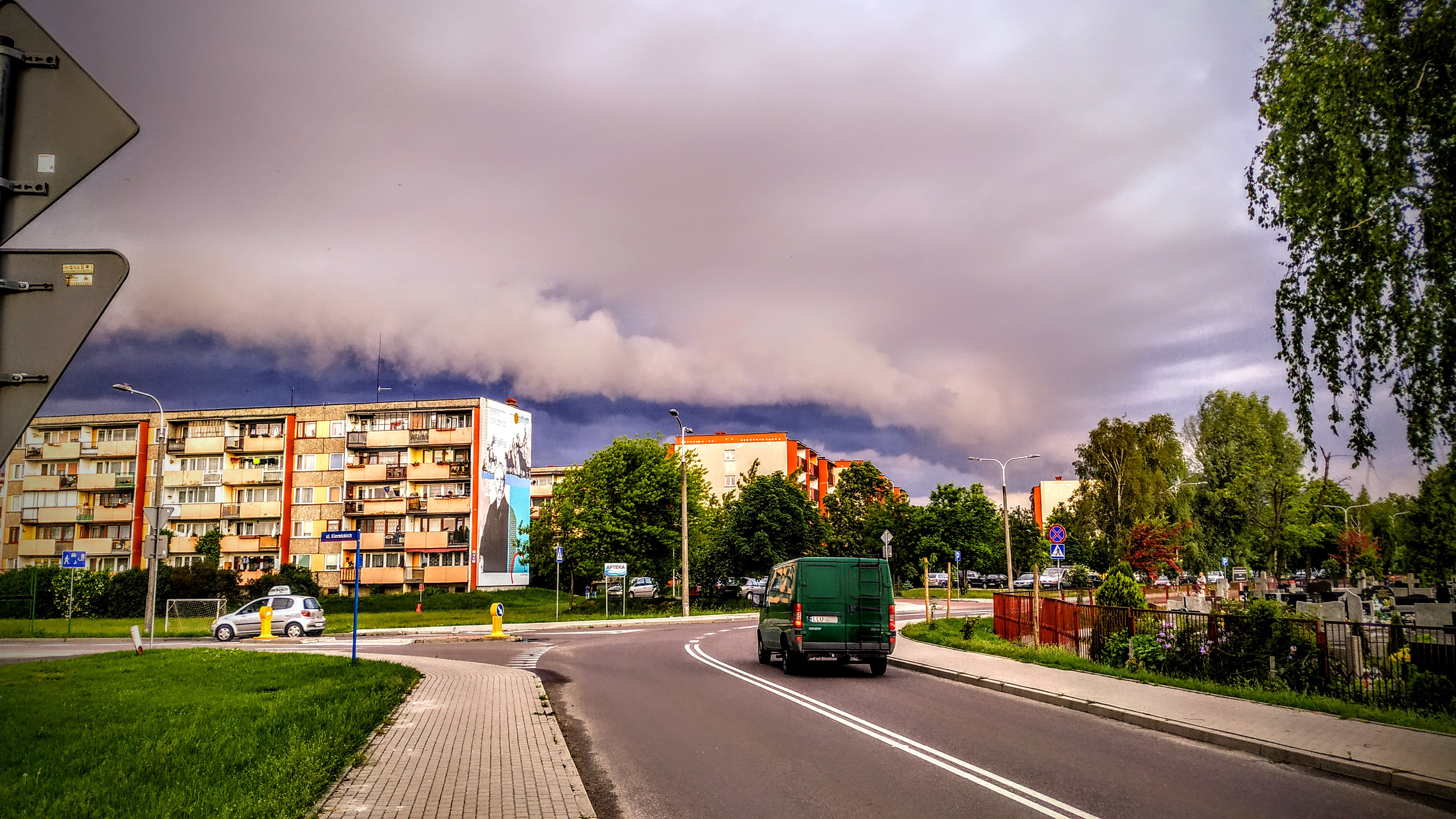 Widok na bloki na os. Sienkiewicza w Łukowie. Na niebie widoczny nadciągający wał szkwałowy.